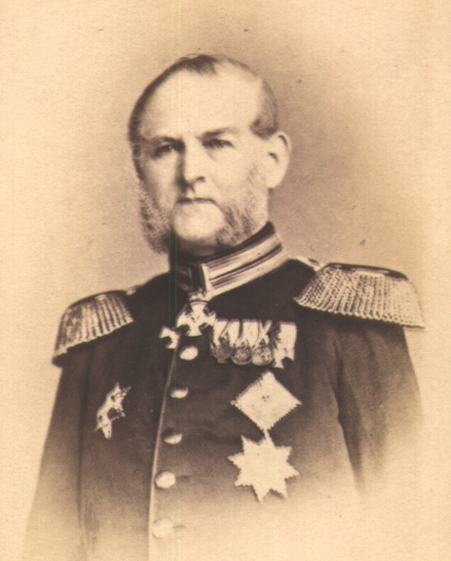 Porträt Heinrich Gottfried Grimm